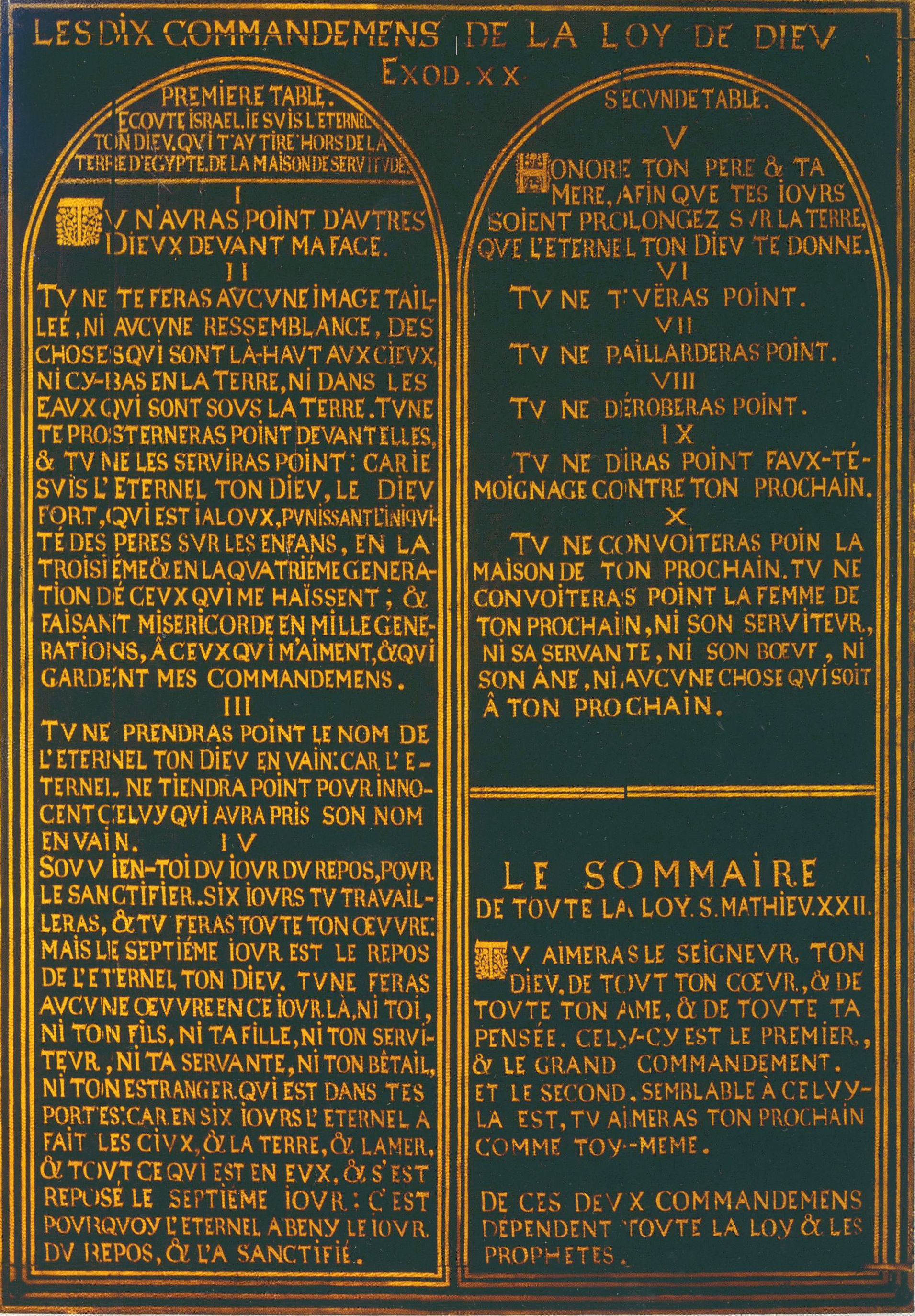 Dekalogtafel in der reformierten Kirche in Celle; Ölfarbe auf Holz, unbekannter Künstler, ca. 1720